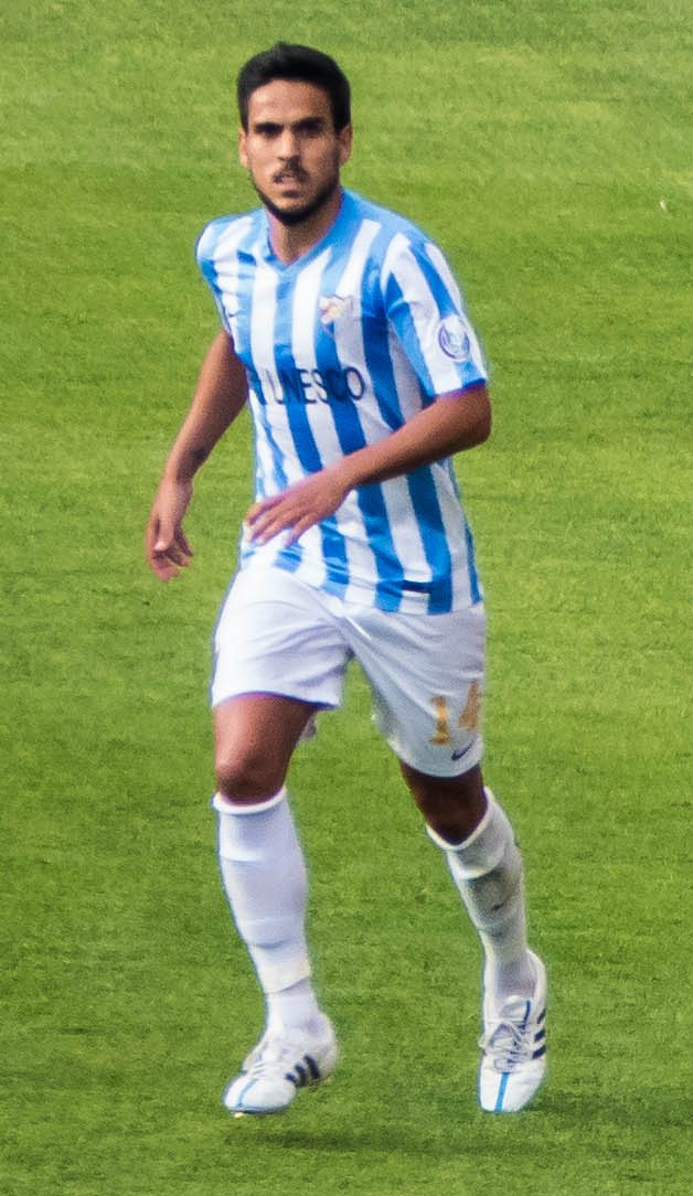 Partido Málaga - Sevilla 23/5/2015